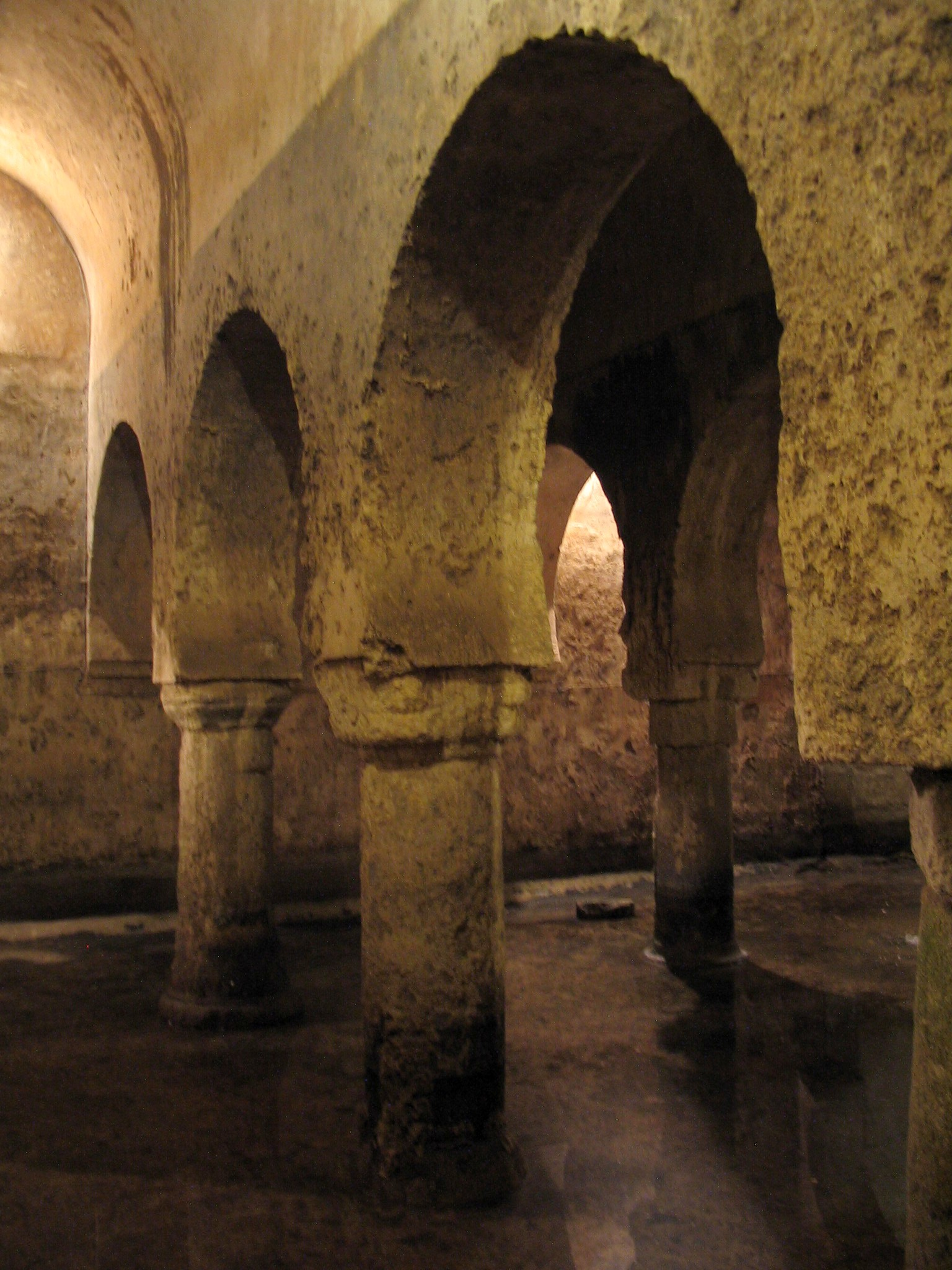 Aljibe, citerne souterraine d'origine arabe, Caceres, Extremadure, Espagne.